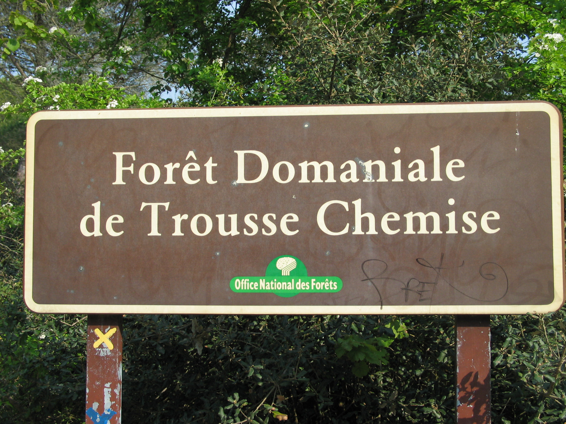 Panneau indiquant sur l'île de Ré (France) le bois de «Trousse chemise»